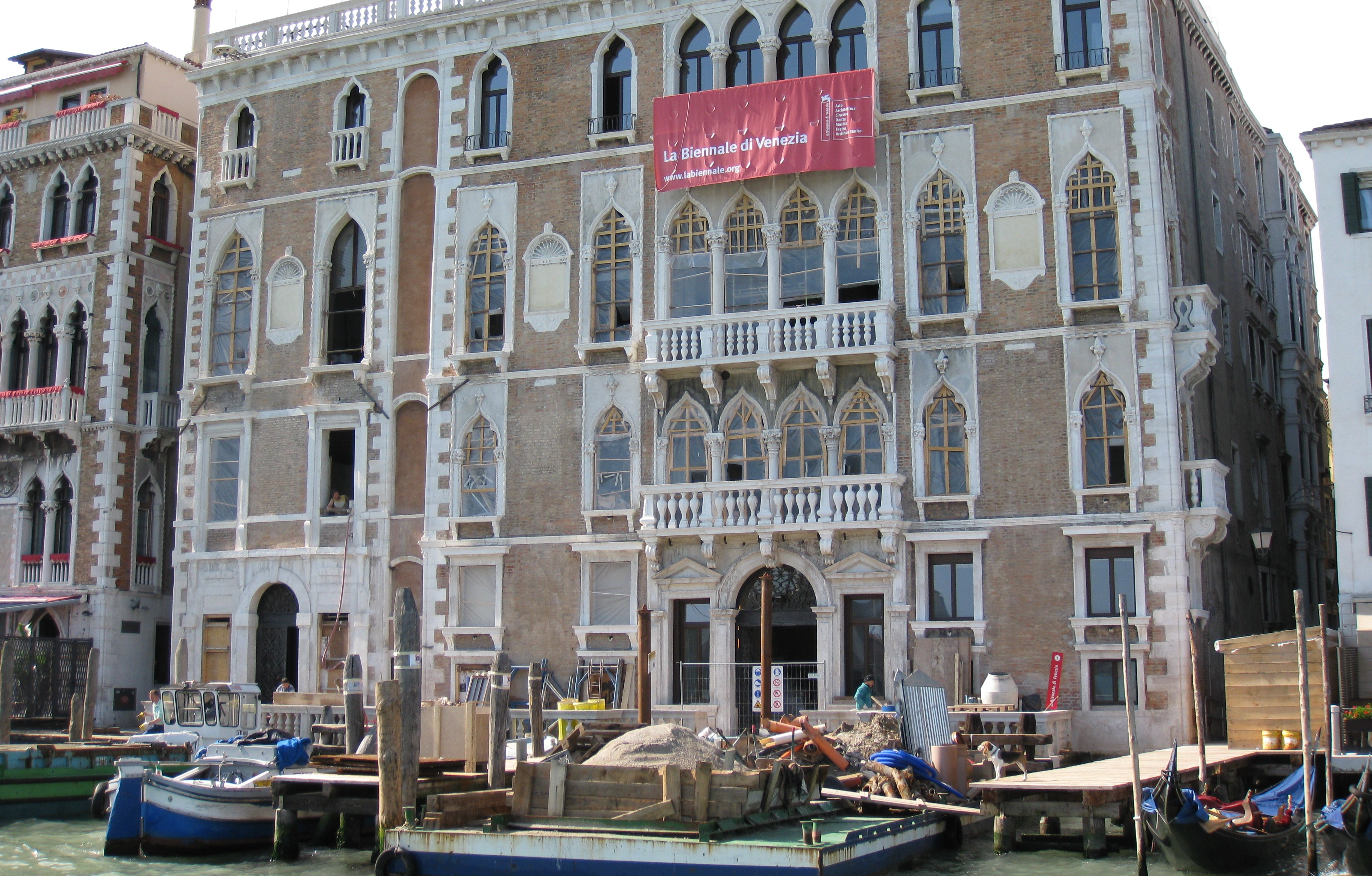 Palazzo Guistinian